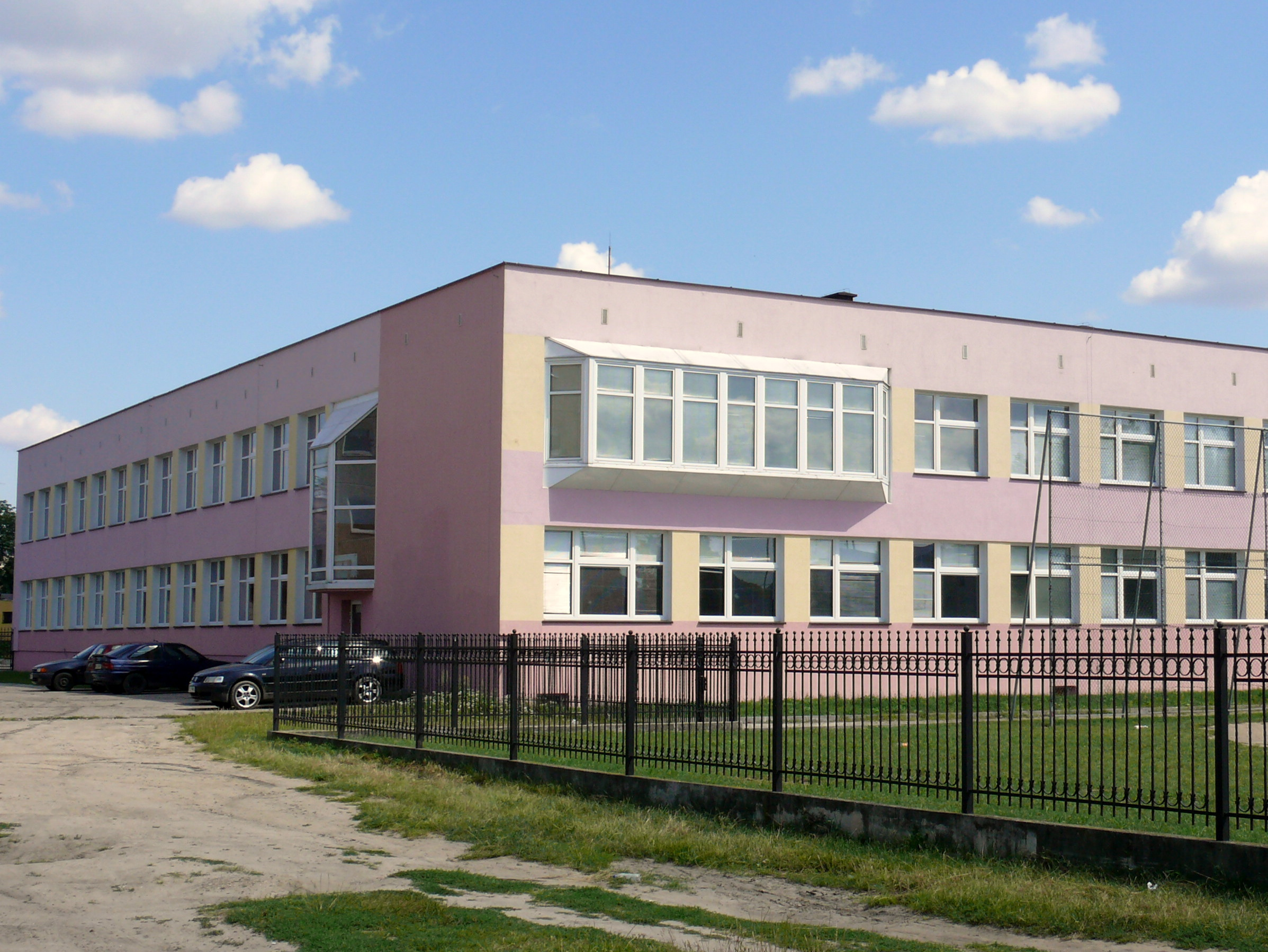 LO w Kole